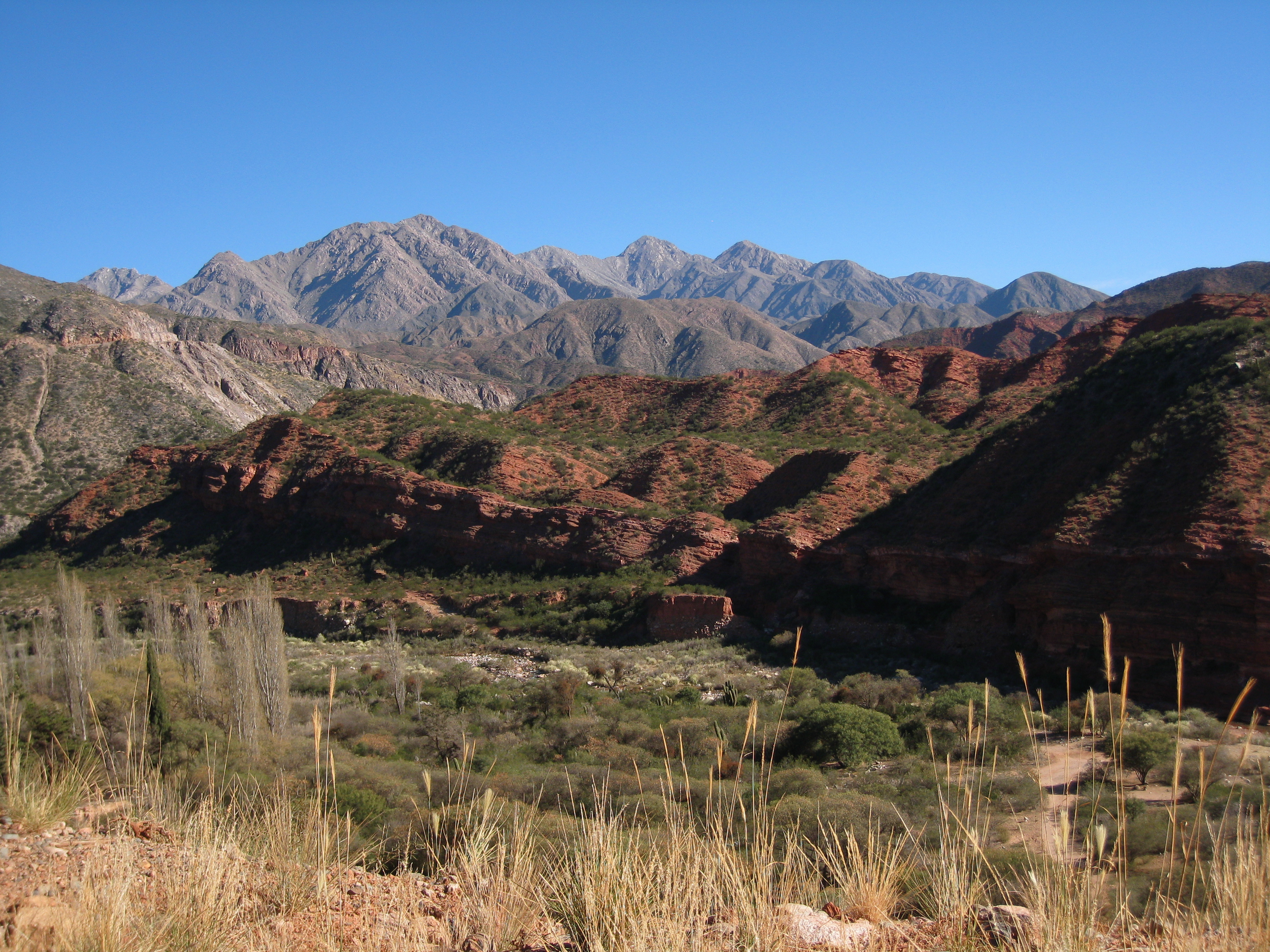 La Rioja region in Argentina